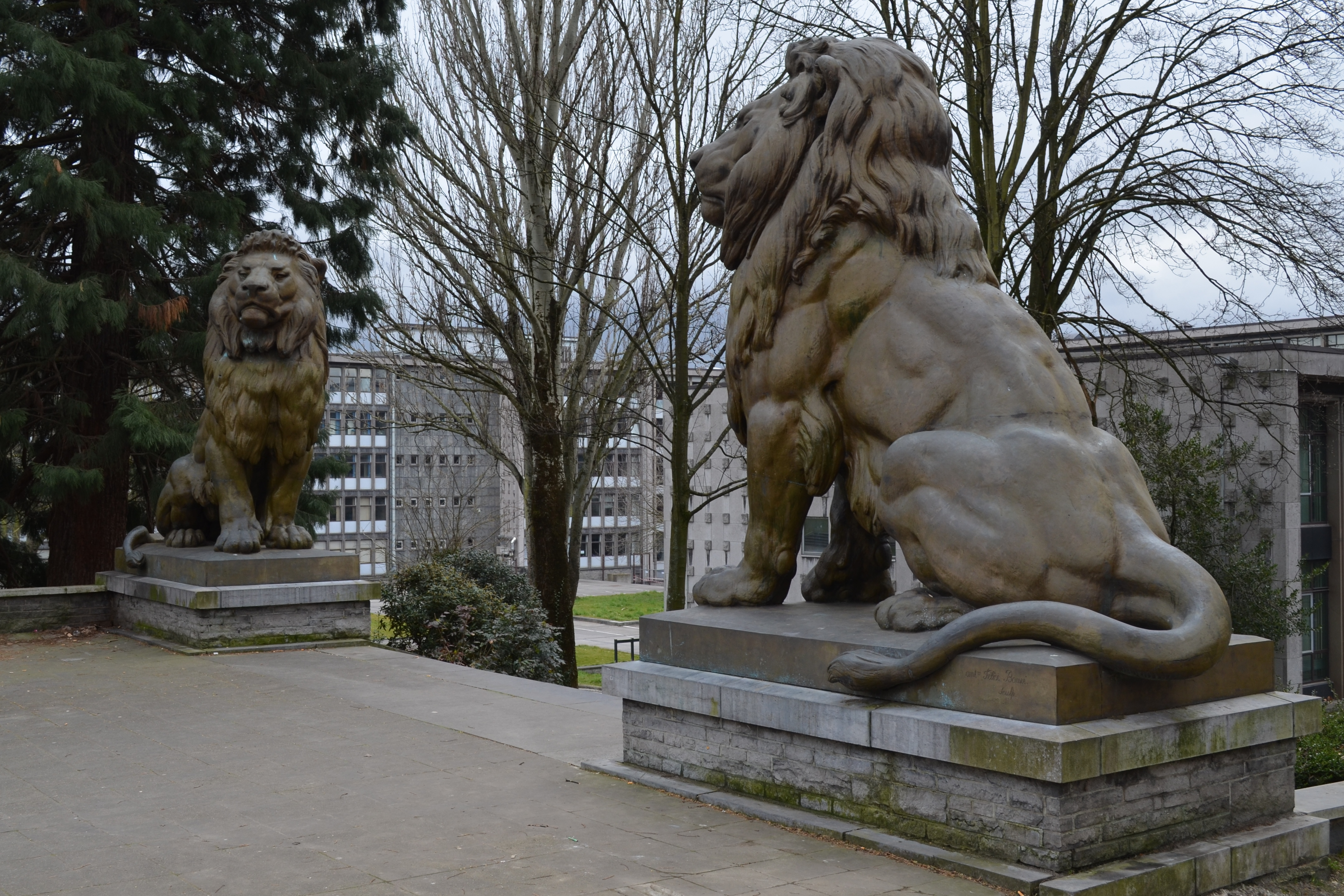 Totor et Tutur, surnoms donnés aux deux lions de bronze, oeuvre de Félix Antoine Bouré (19ème siècle). Anciennement placés sur les marches du Palais de Justice aujourd'hui démoli du boulevard Audent à Charleroi. Actuellement boulevard Defontaine, à proximité du nouveau Palais de Justice.